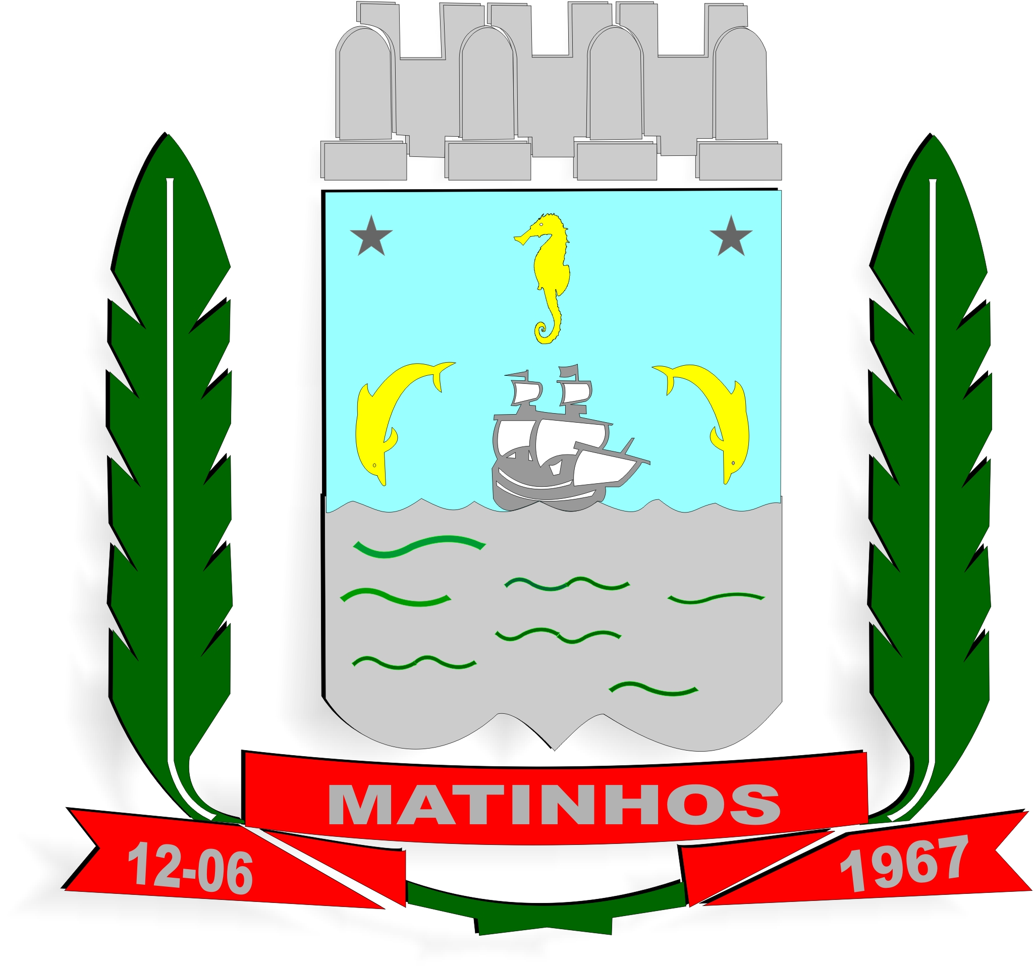 Brasão de Armas do Município de Matinhos